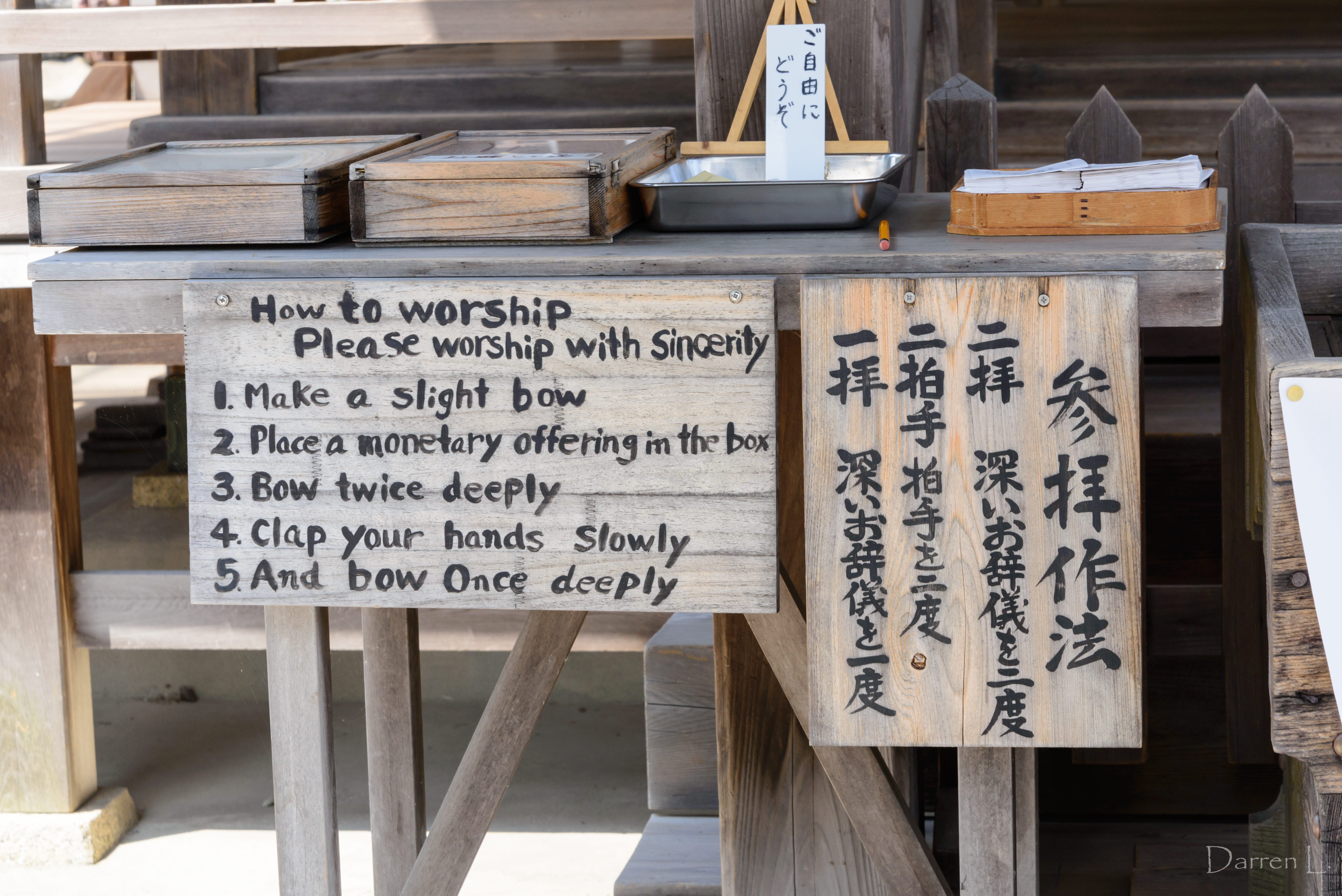 2016 Nagoya